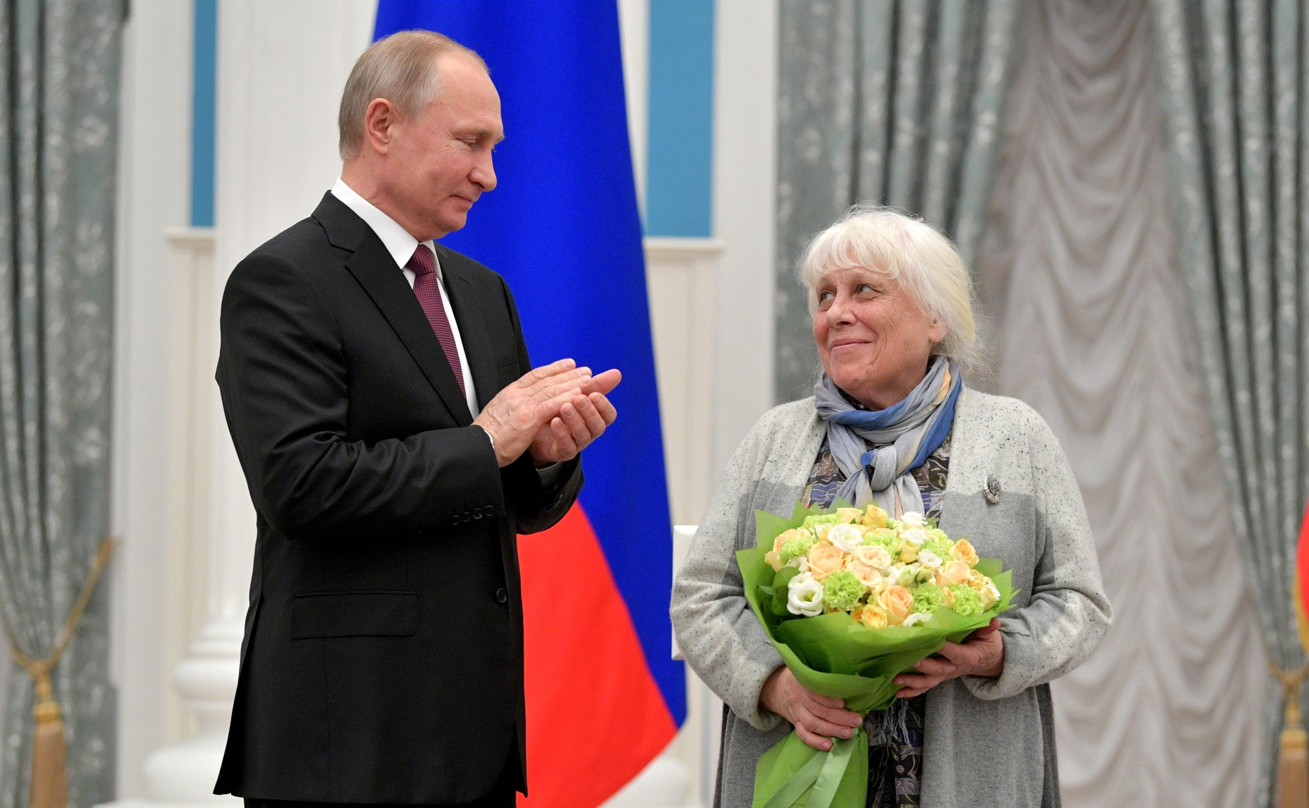 Советский и российский художник-постановщик мультипликационных фильмов Франческа Ярбусова на церемонии вручения Премии Президента Российской Федерации